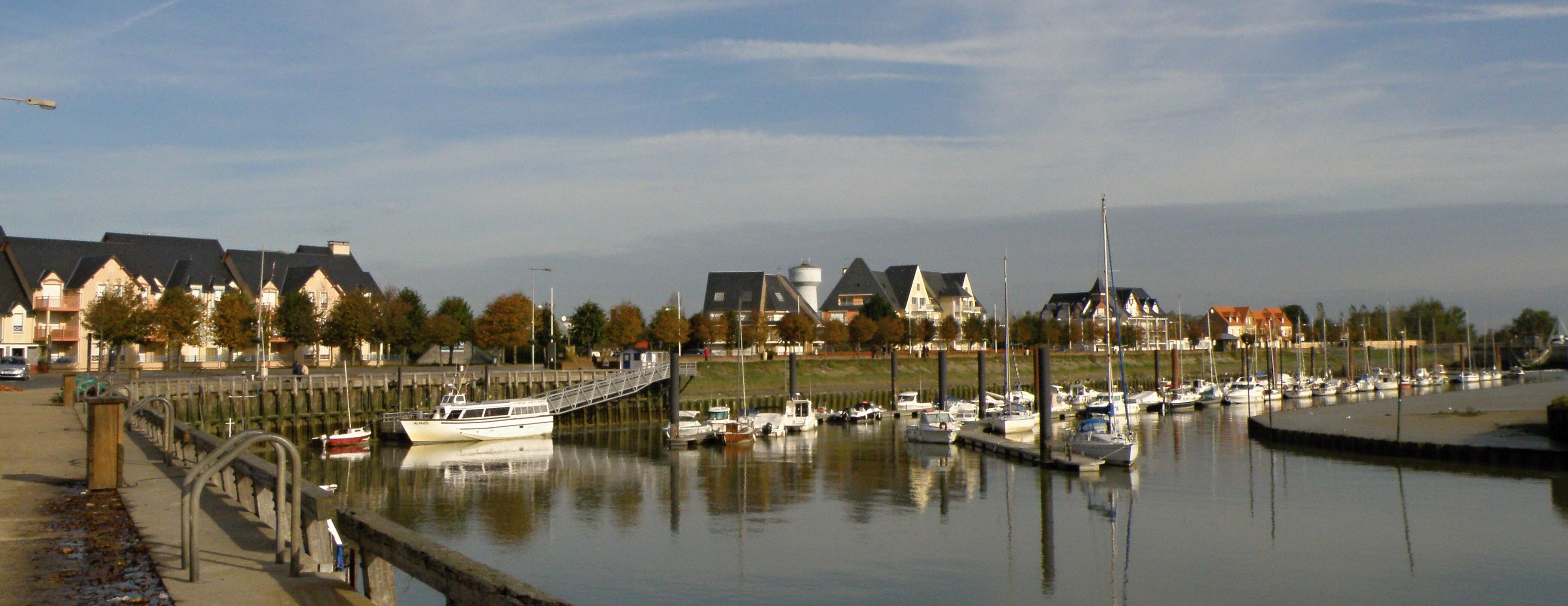 Port w Le Crotoy we Francji podczas odpływu.